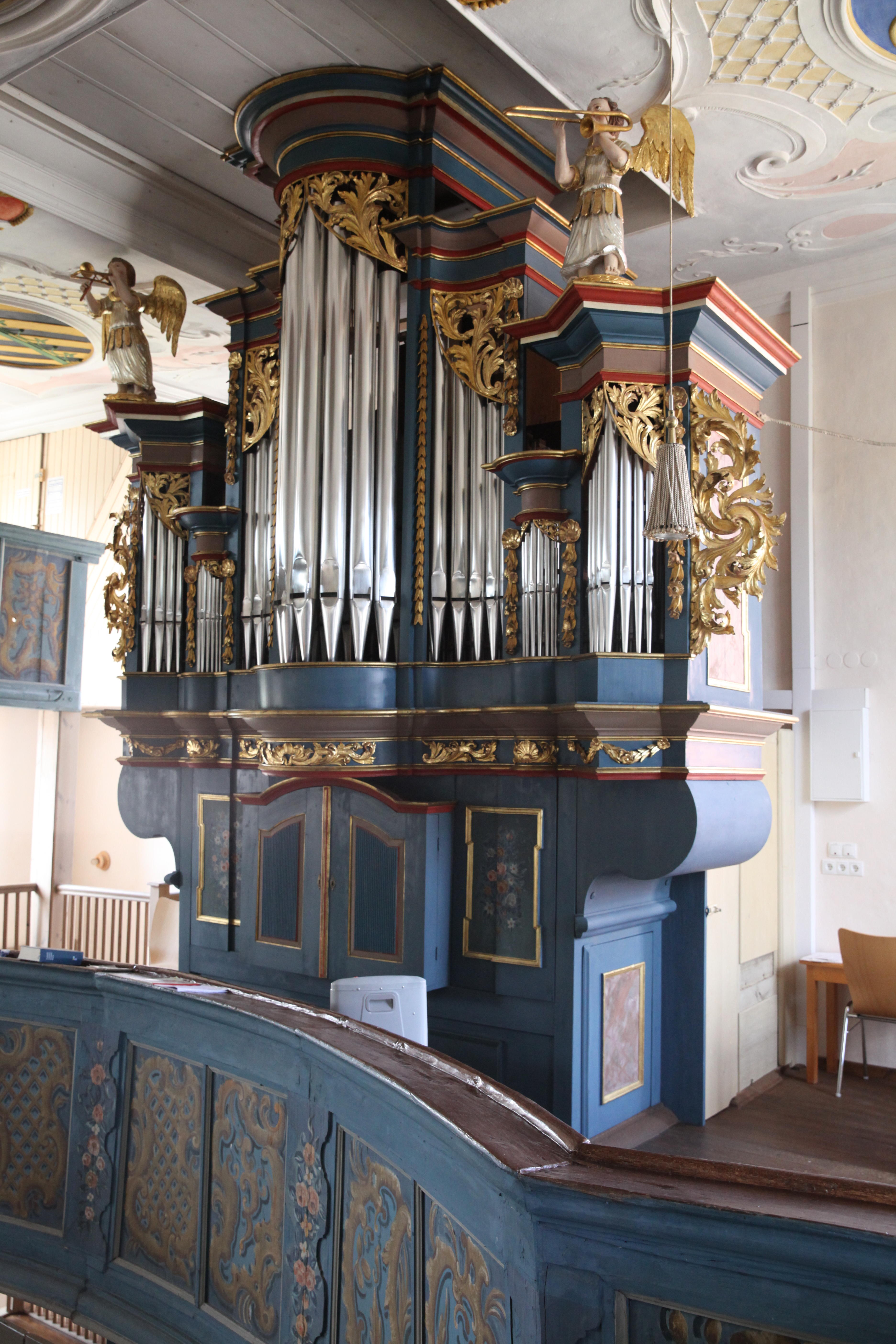 Orgel, Evangelische Marienkirche in Watzendorf